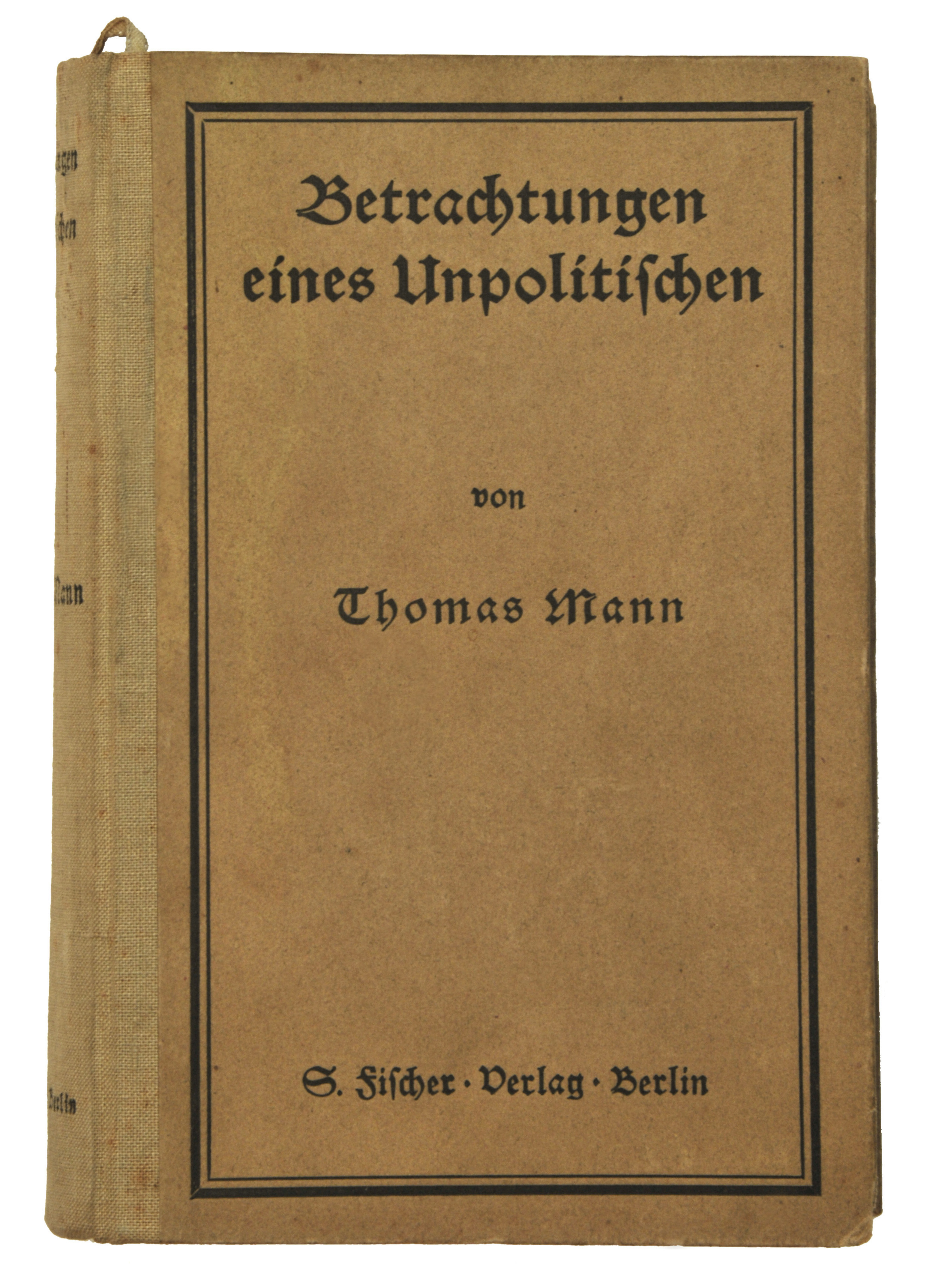 Thomas Mann: Betrachtungen eines Unpolitischen. Berlin: S. Fischer 1918, 611 Seiten, Erstdruck (Potempa G 108.1, Bürgin I 12, Wilpert/Gühring² 14). Orig.- Halbleinen 19,5 x 13 cm.